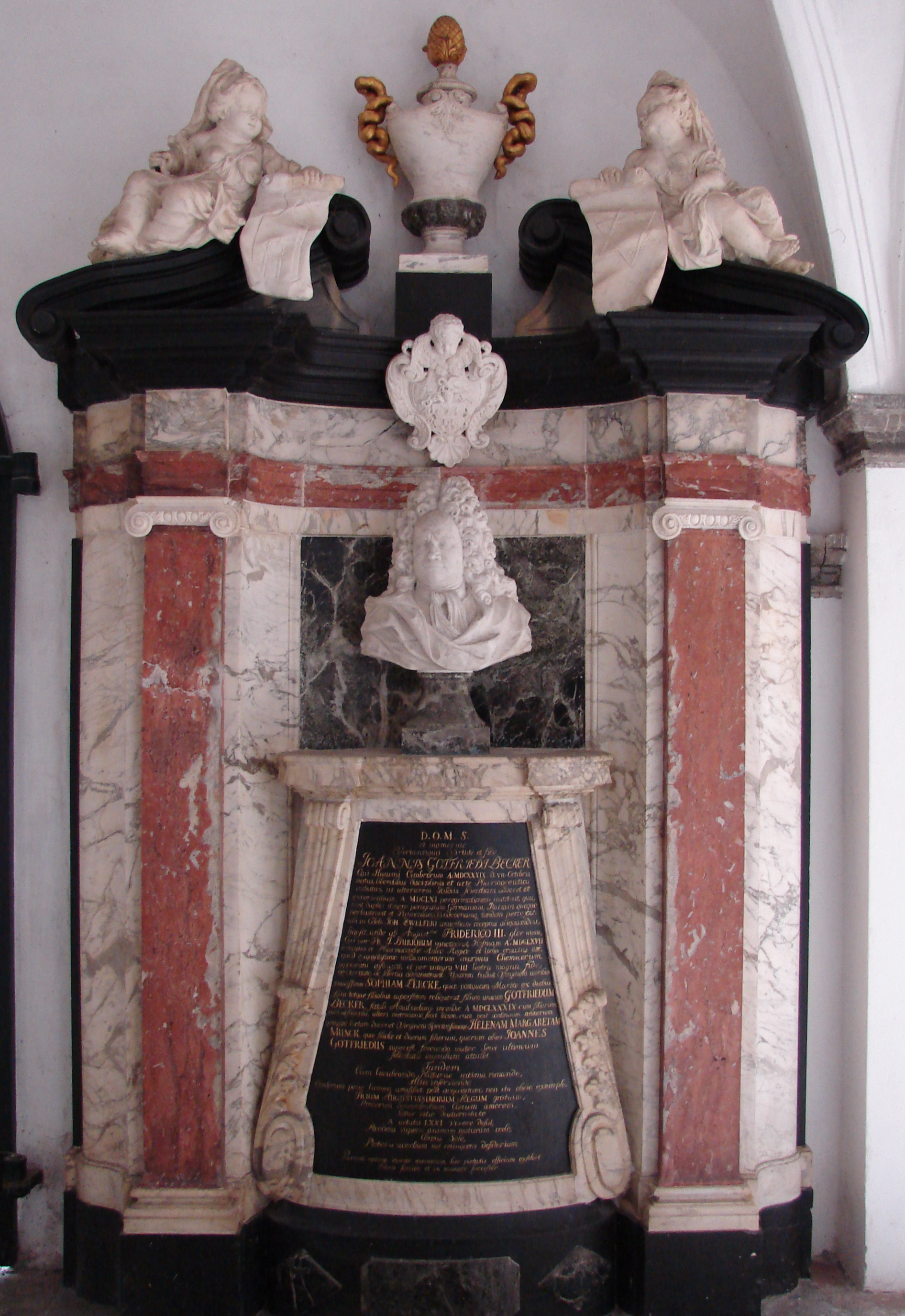 Johann Gottfried Becker (1639-1711), gravmonument af A. Gercken i Sankt Petri Kirkes gravkapeller, København